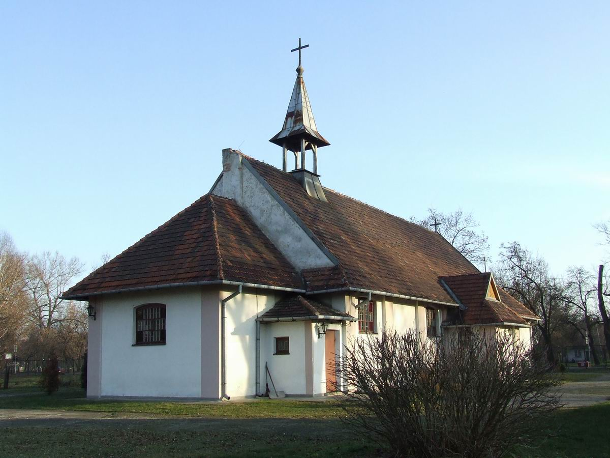 Kościół pw. Zmartwychwstania Pańskiego na Targówku Fabrycznym